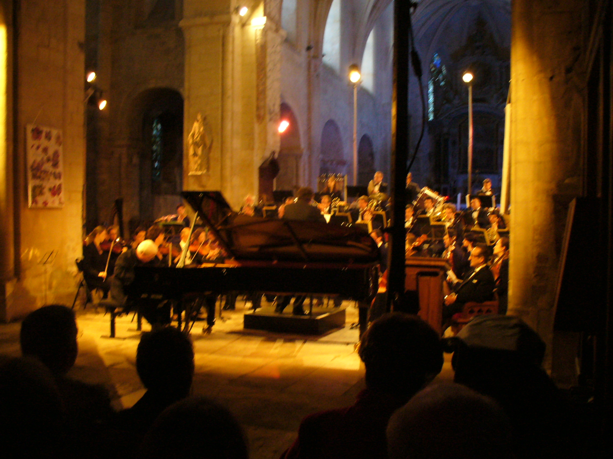 Orchestre André Messager, piano Raphaël Drouin, texte Dominique Preschez, direction Thierry Pélican